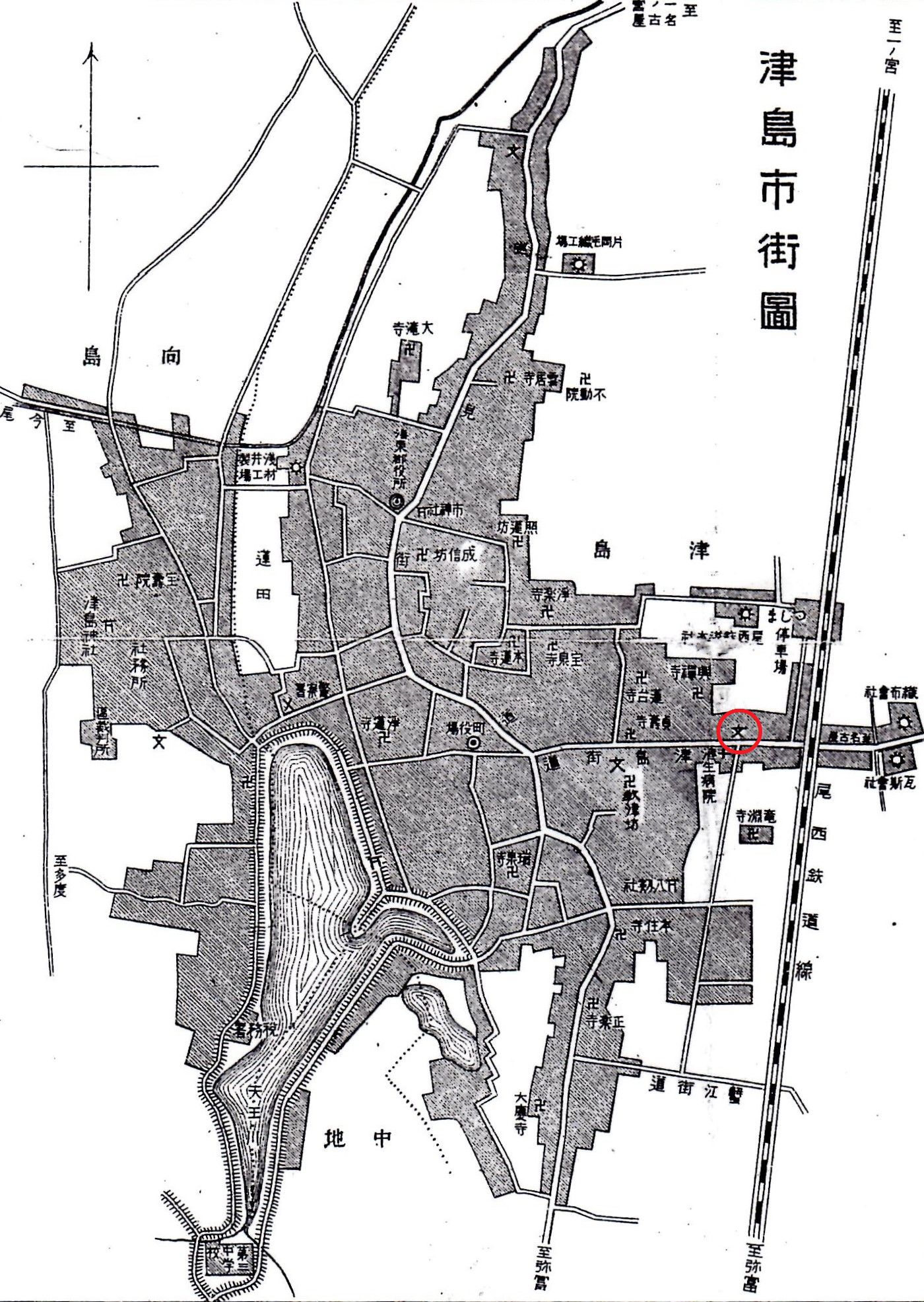 1910年（明治43年）に海東郡役所が発行した『海東郡全圖』における『津島市街圖』。藤里尋常高等小学校今市場仮教場の位置を赤丸で記した。